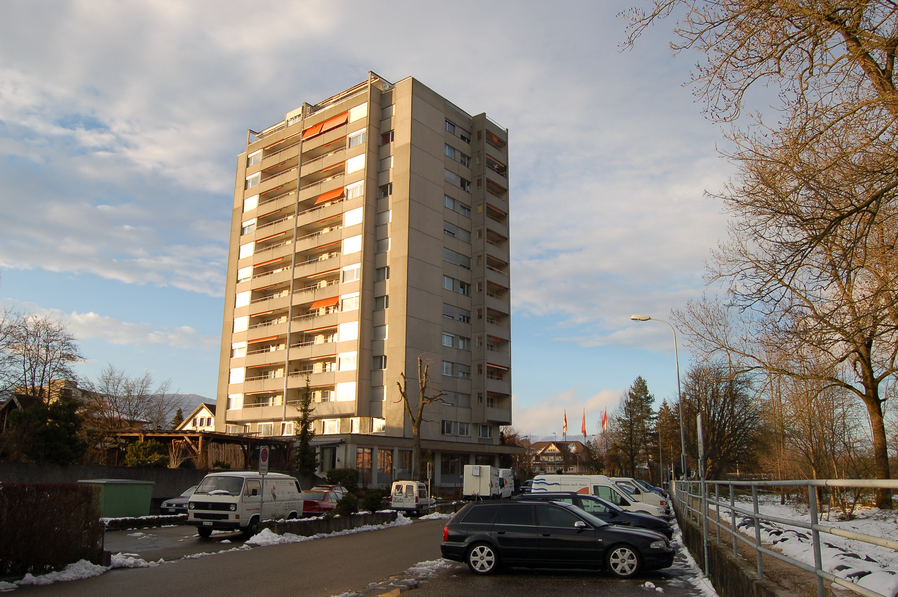 Hochhaus Emmenpark Biberist